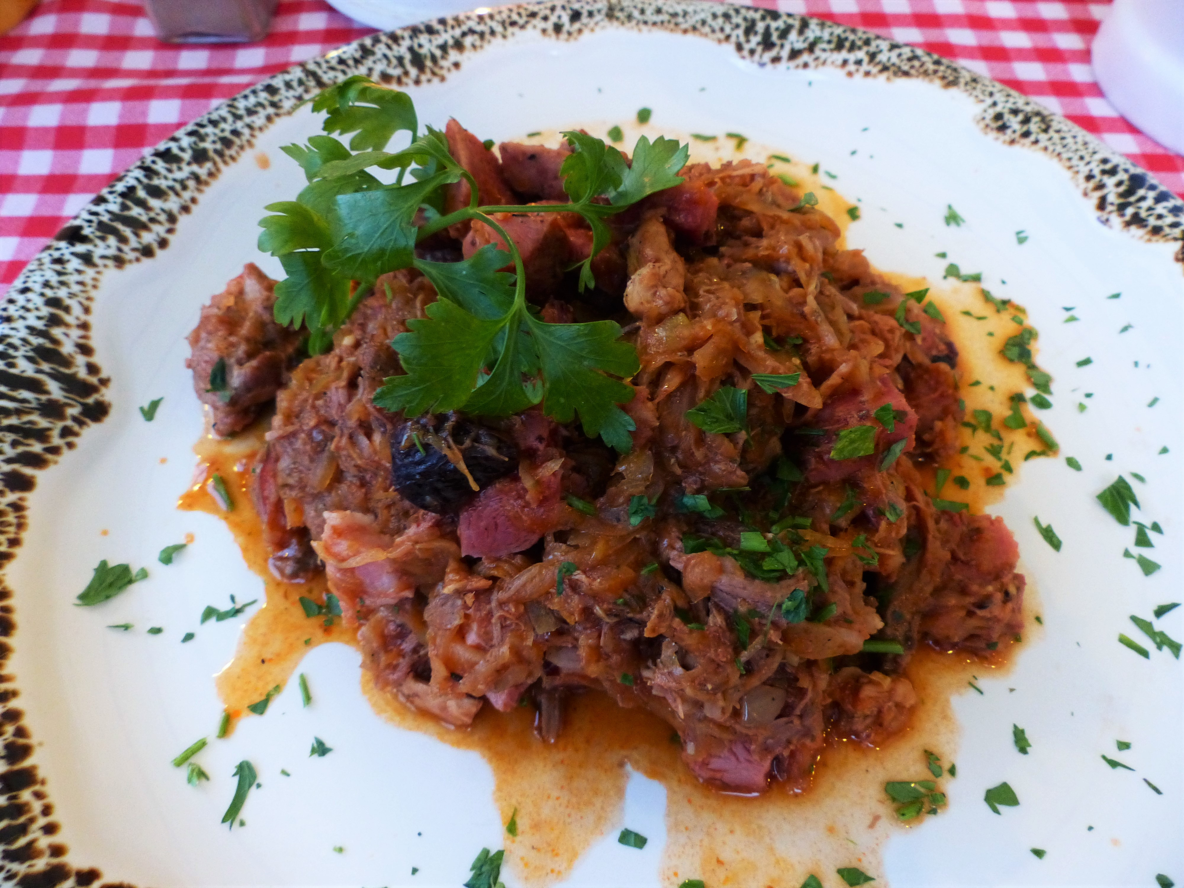 Bigos, Restaurant am Rathaus: Karczma Lwowska, Wroclaw / Breslau